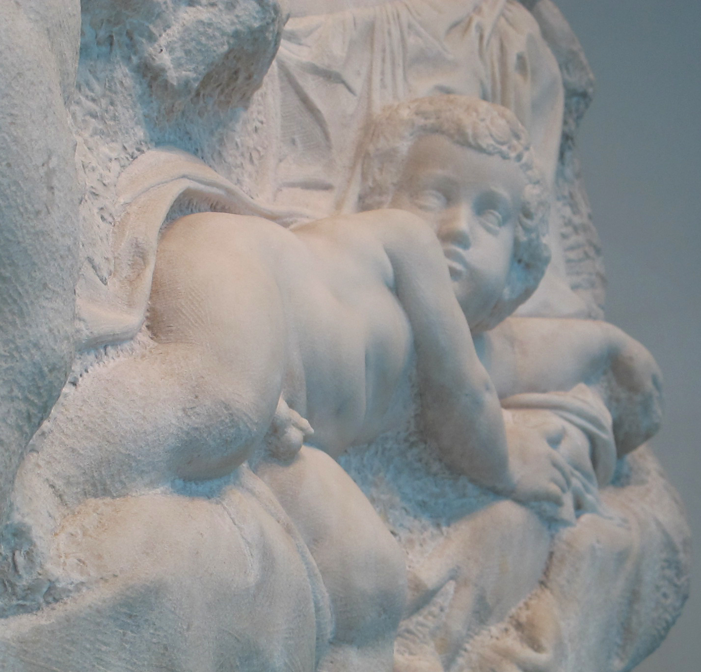 Michelangelo, tondo taddei, 1504-05 ca.